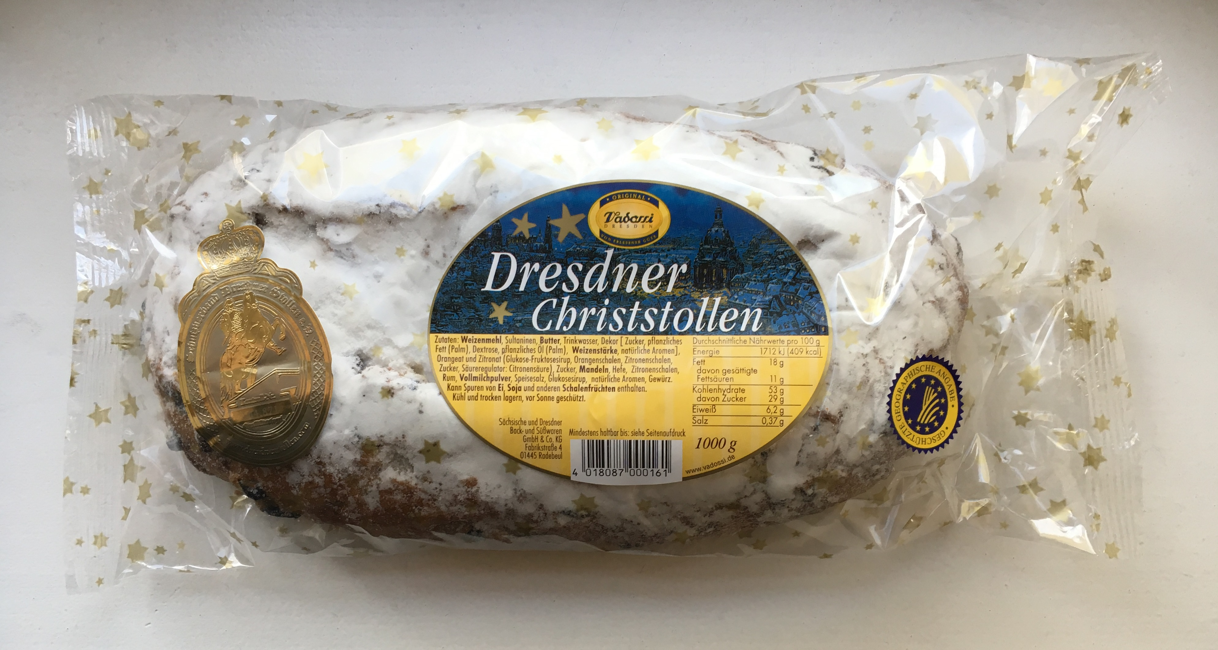 Radebeul, Nudossi